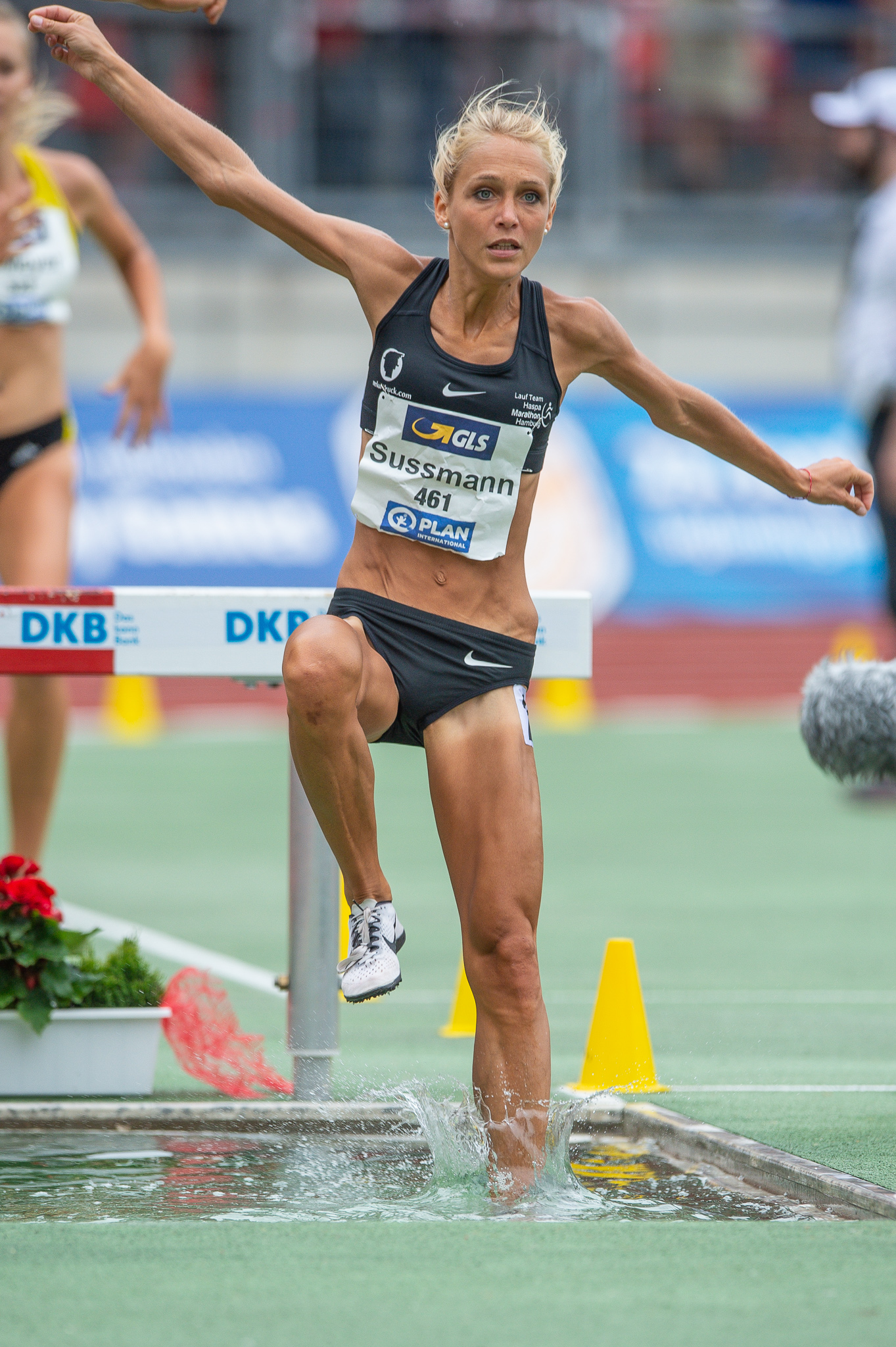 3000 Meter Hindernislauf,DLV,Deutsche Leichtathletik Meisterschaften 2018,Deutscher Leichtathletik-Verband,Jana Sussmann,Lauf-Team Haspa Marathon Hamburg,Max-Morlock-Stadion,Steeplechase